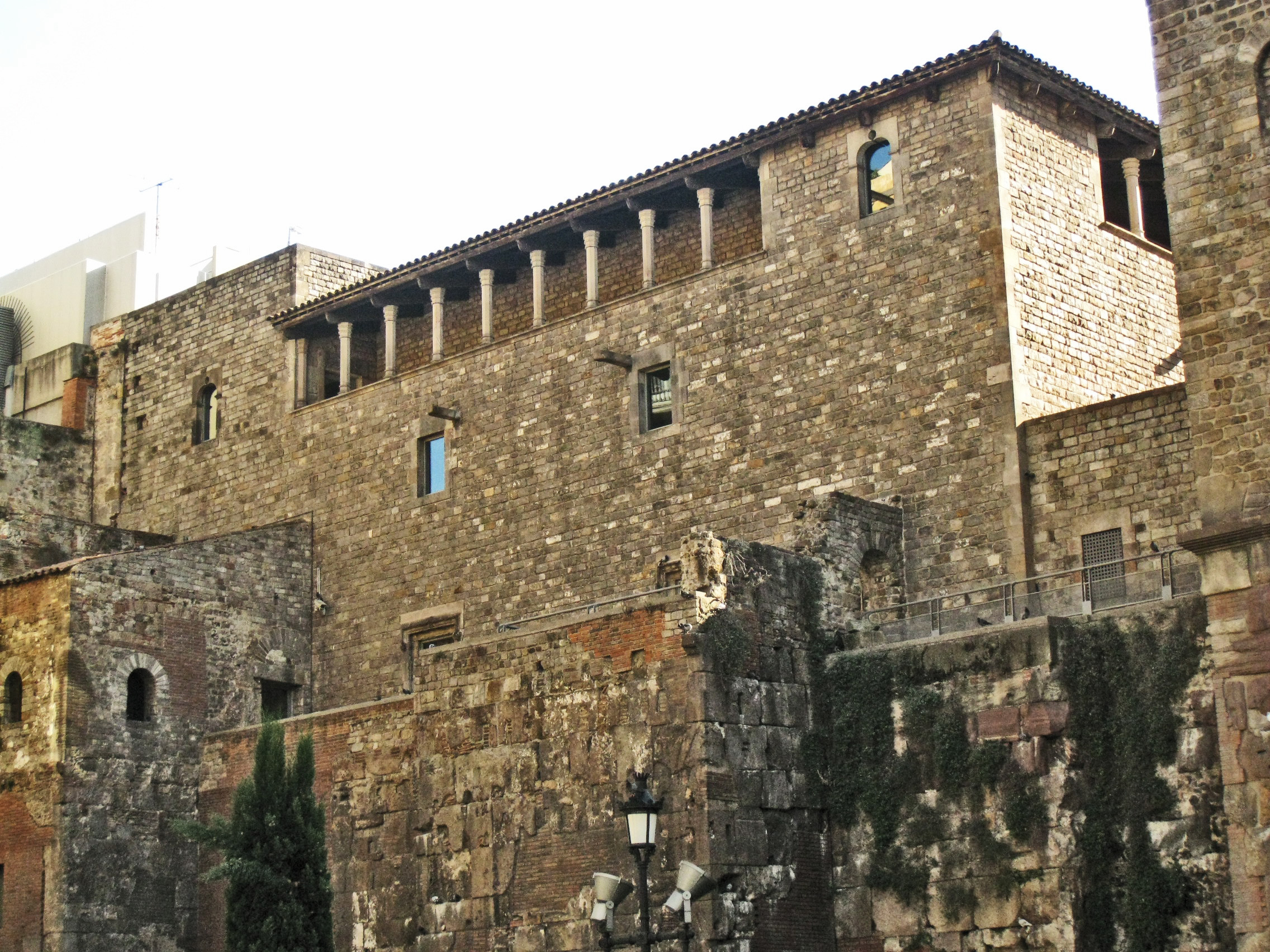 Casa Padellàs (s. XV), seu del Museu d'Història de la Ciutat, vista des del carrer de la Tapineria, al barri Gòtic de Barcelona. A sota s'hi veuen les restes de la muralla romana, damunt la qual s'aixeca la casa, que fou traslladada aquí quan es va obrir la Via Laietana.